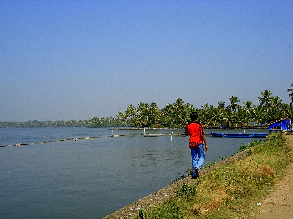 Kumbalangi